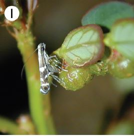 Epicephala parasitica